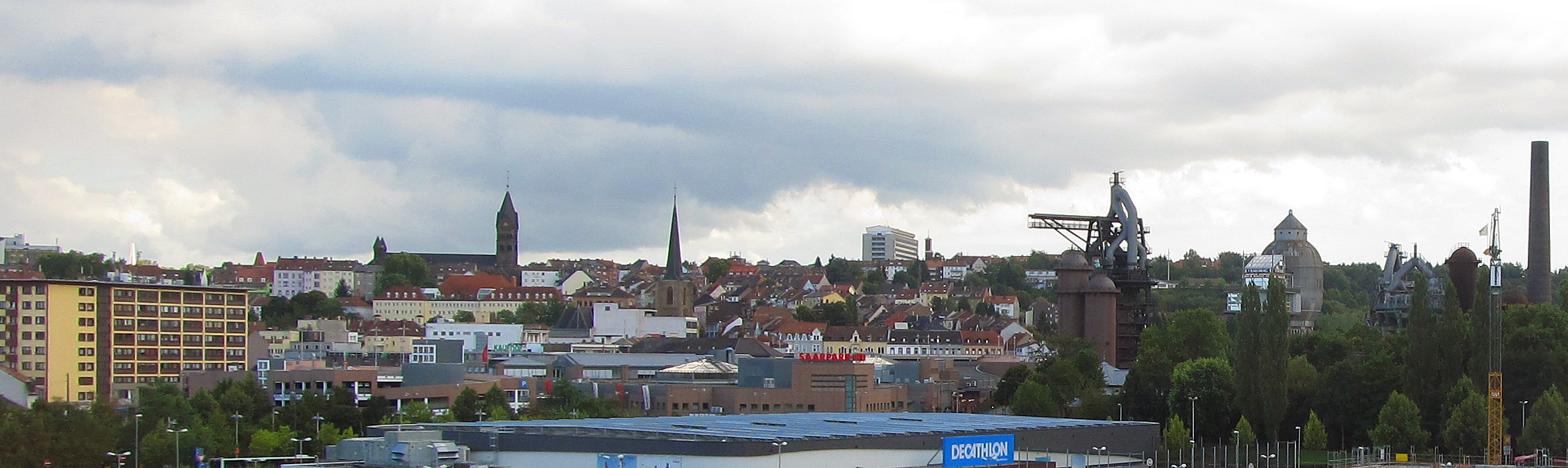 Blick auf Neunkirchen, Saarland